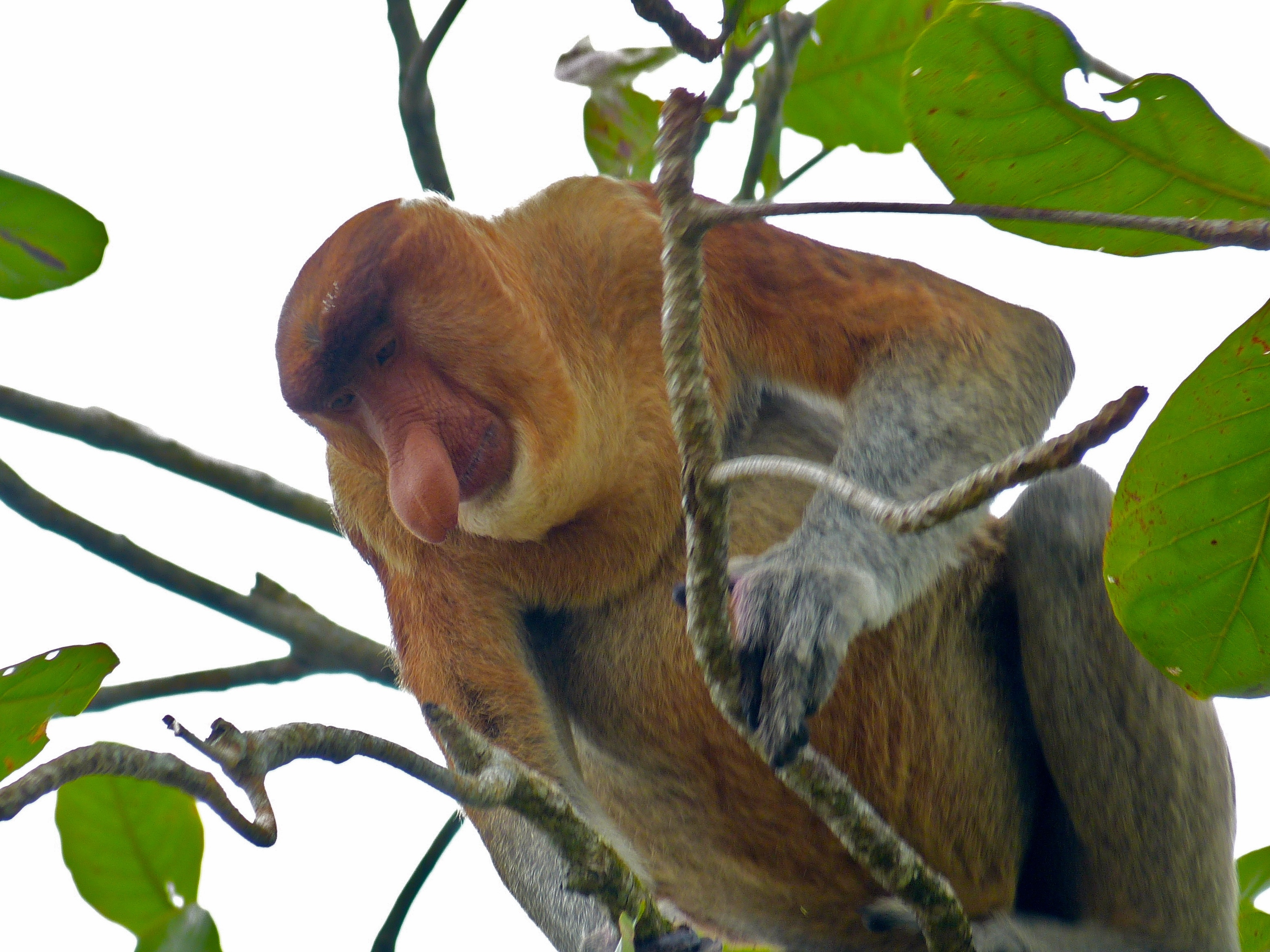 Bako NP, Sarawak, MALAYSIA